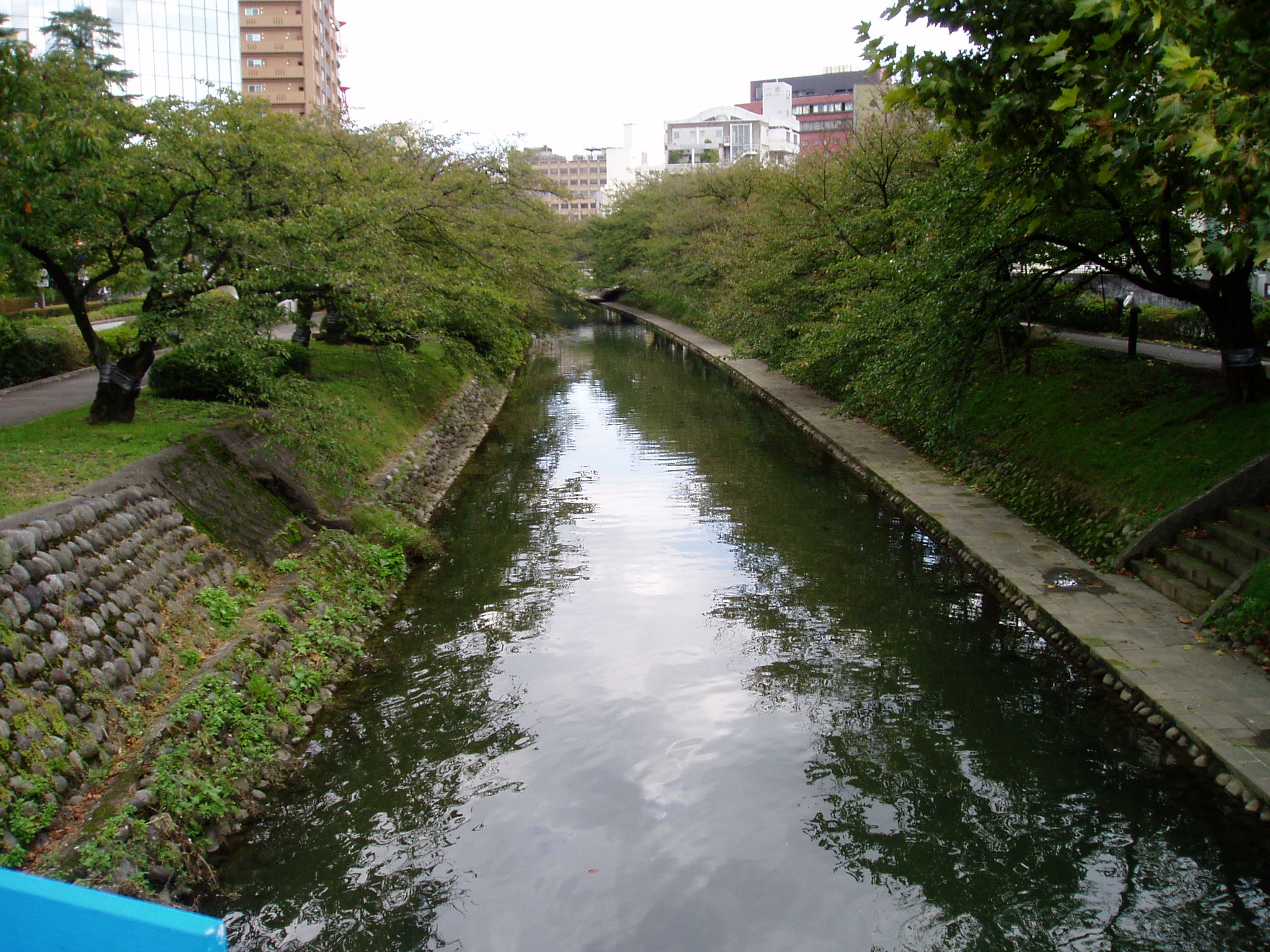 富山市役所前から撮影した松川